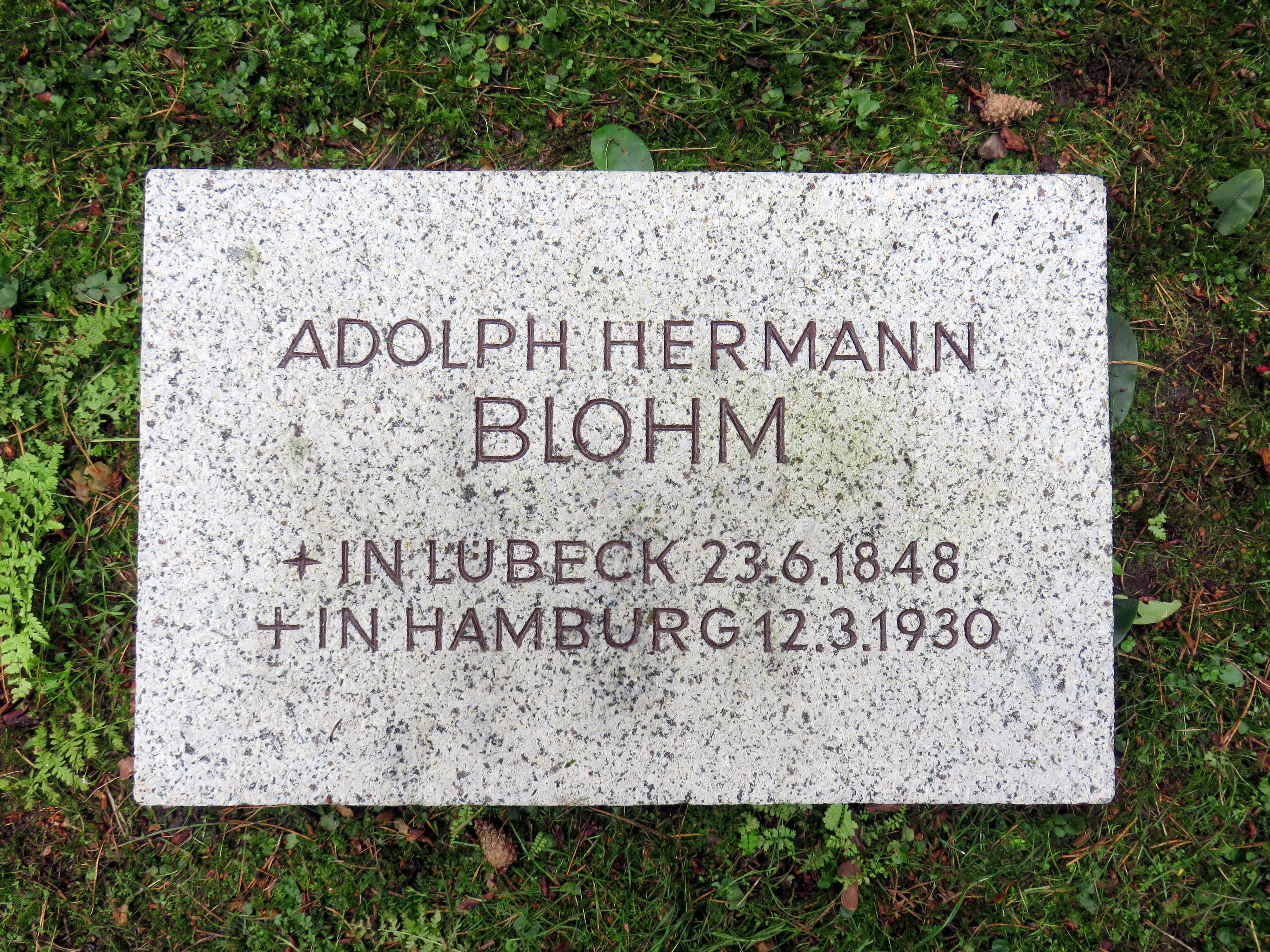 Grabstätte für den deutschen Ingenieur und Mitbegründer der Schiffswerft Blohm & Voss Adolph Hermann Blohm und seine Familie auf dem Ohlsdorfer Friedhof, Standort: Planquadrat Q 25 (nahe Wasserturm Cordesallee).